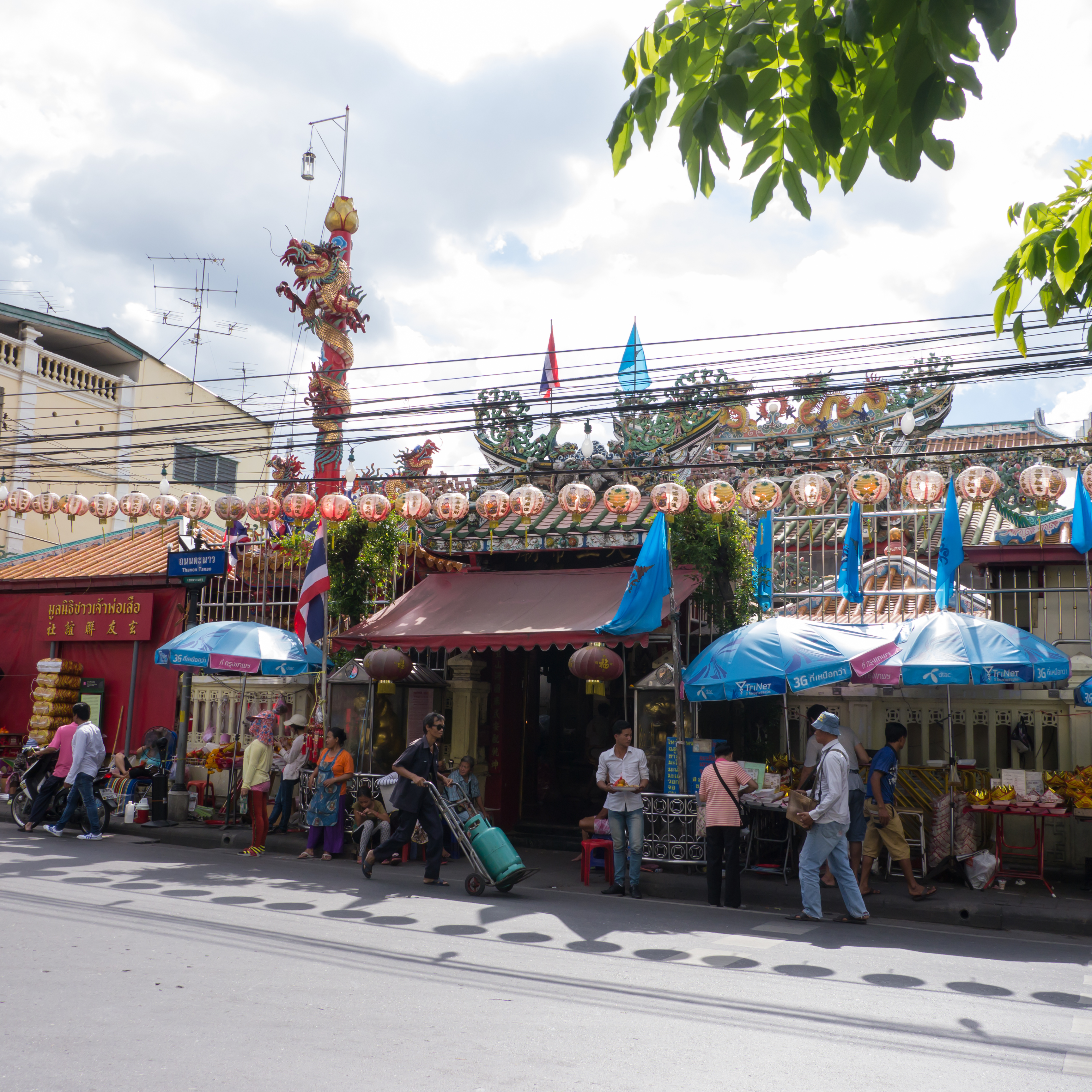 ศาลเจ้าพ่อเสือ